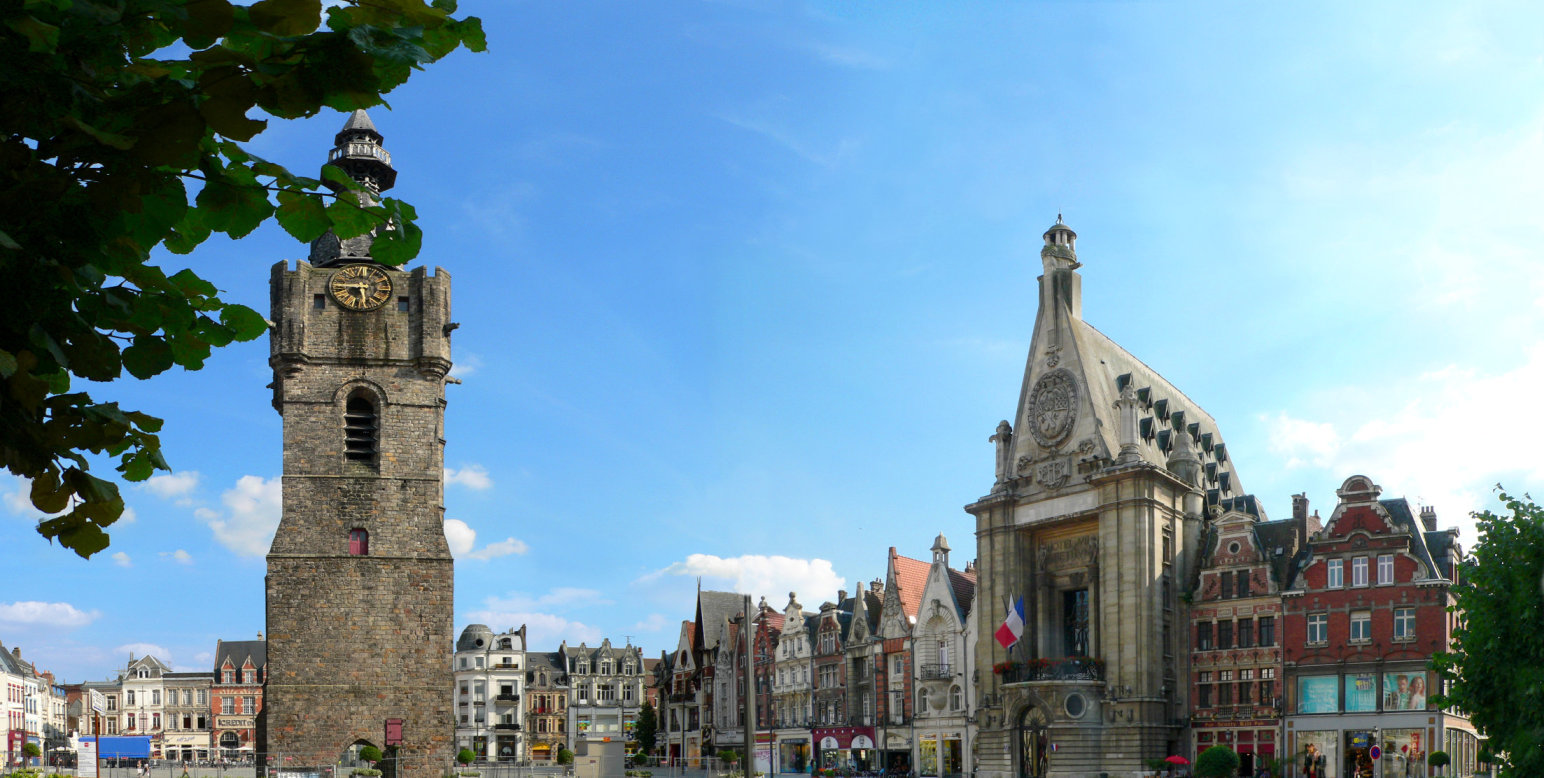 Grand'Place de Béthune (Pas de Calais) en juillet 2007